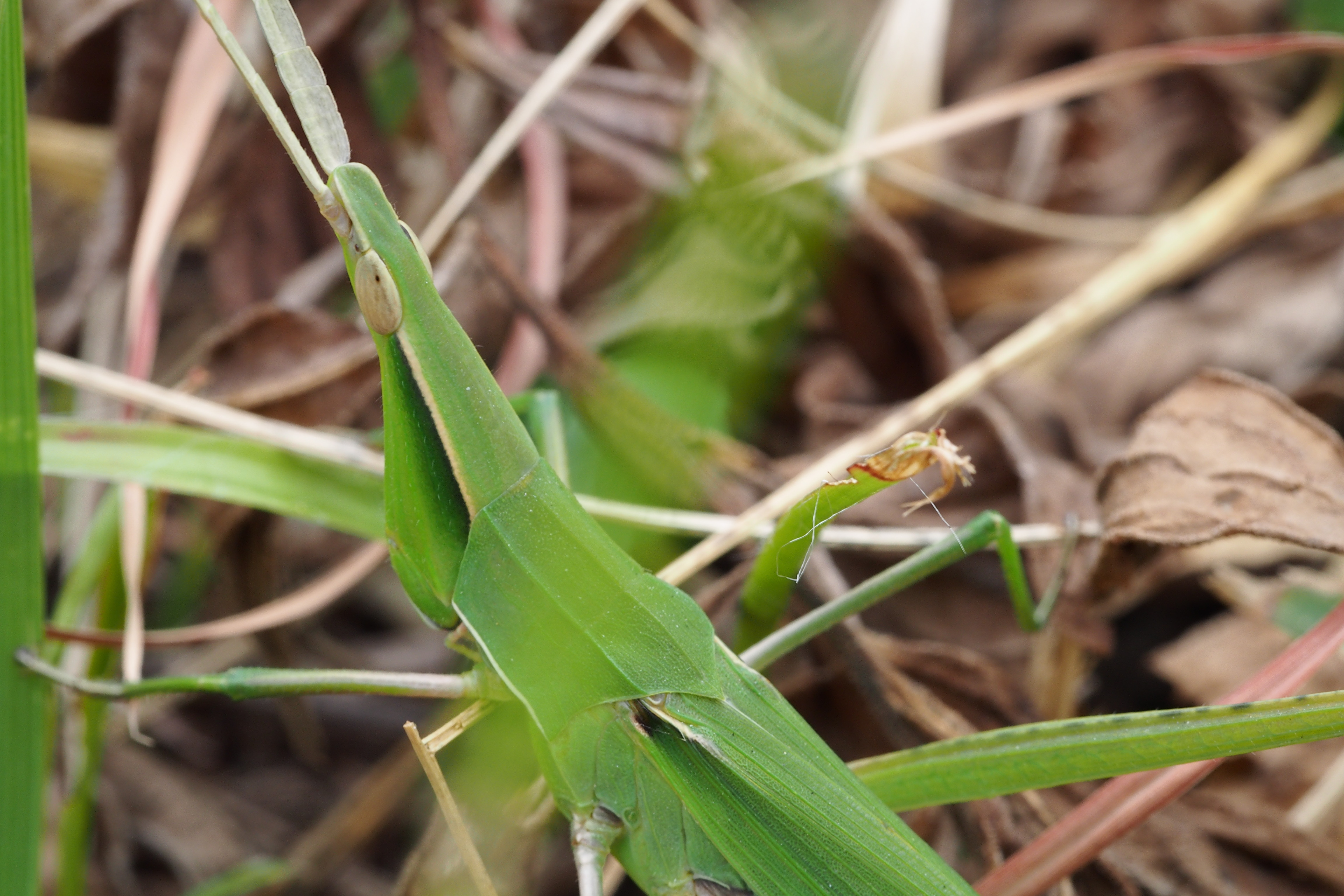 獅子ヶ池